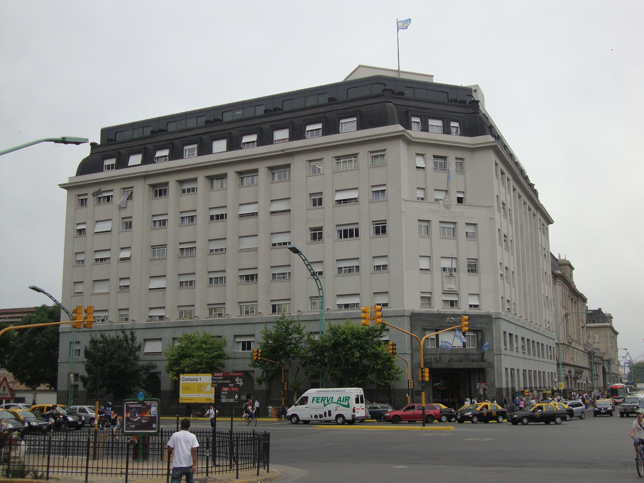 Sede central de la Administración de Infraestructuras Ferroviarias (ADIF) junto a la estación terminal de Retiro. Antiguo edificio de la ONABE, y antes de Ferrocarriles Argentinos. Buenos Aires, Argentina.